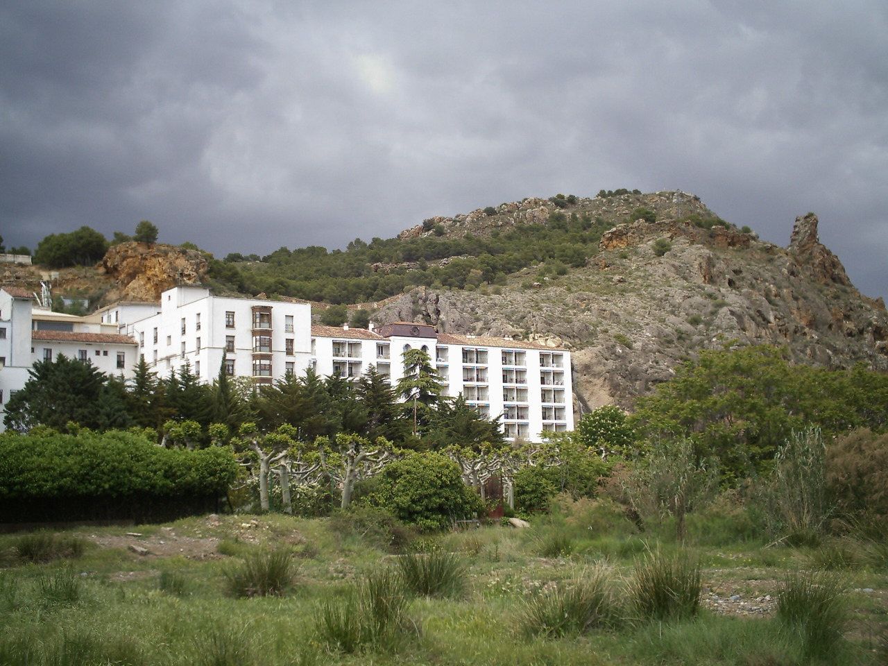 Baños de Fitero, Navarra (España)